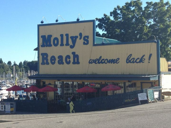 Missing Bruno Gerussi. (Few under 40 remember!) (at Molly's Reach)